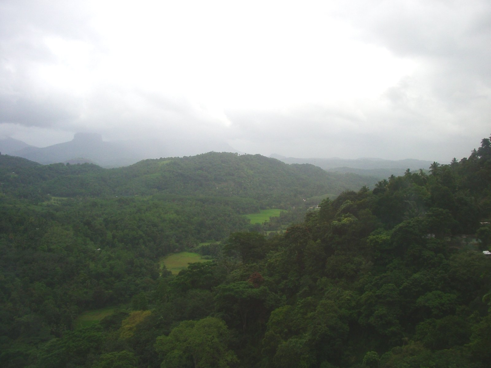 Muntanyes prop de Kandy, província Central, Sri Lanka; foto feta per J. Ollé el juliol del 2006